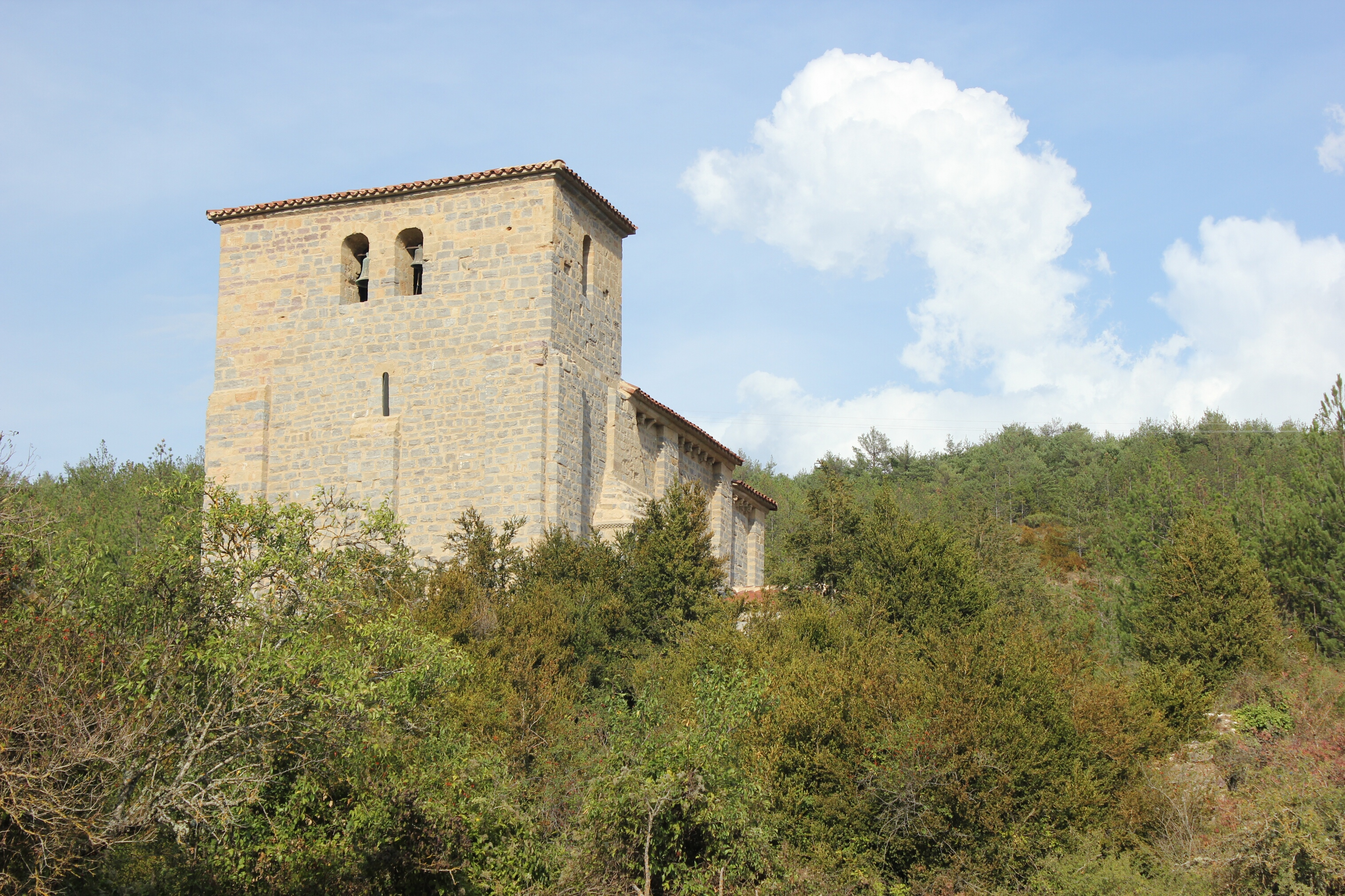 Artziko Santa Maria baseliza